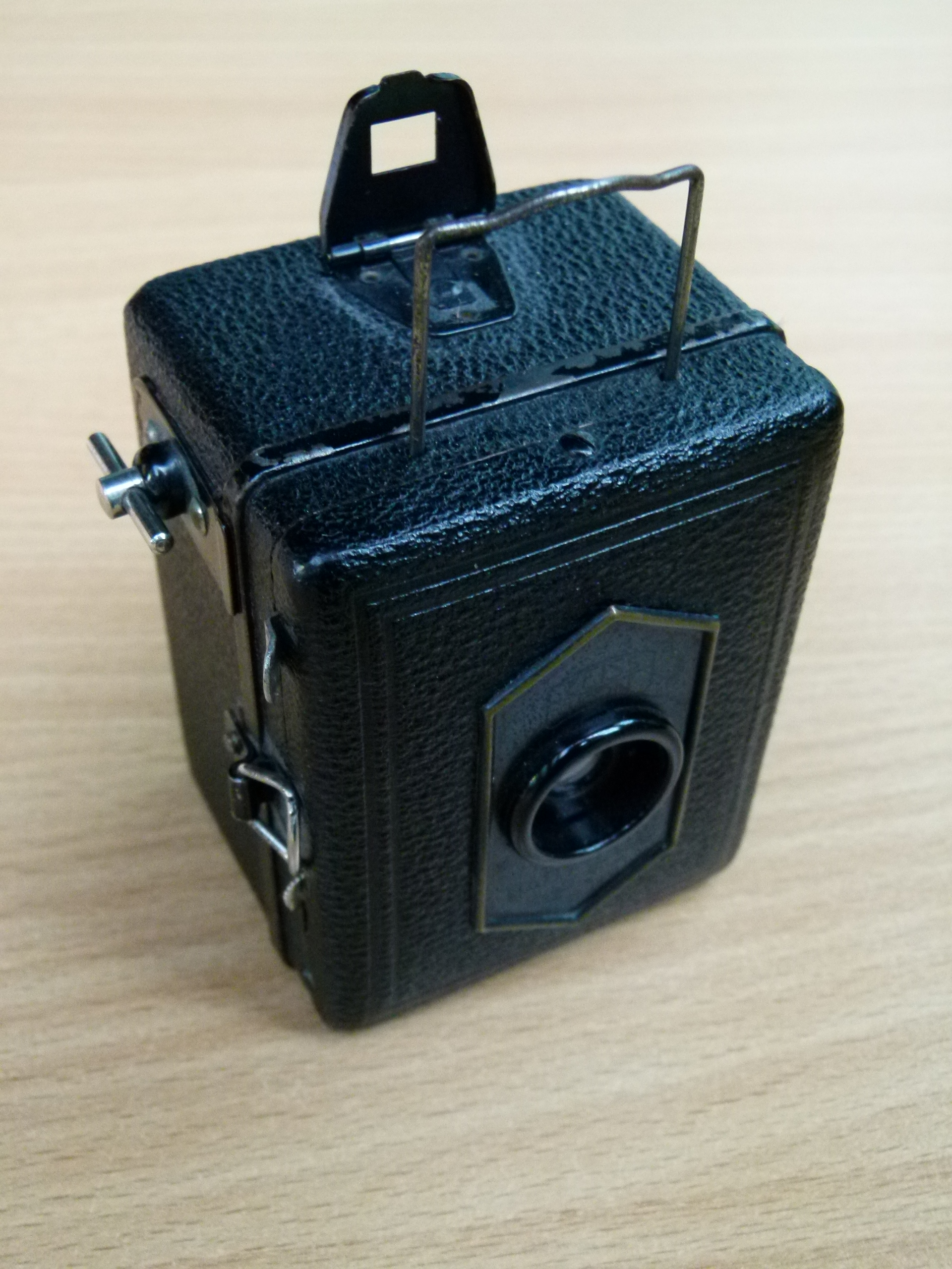 Baby-Box 54/18 Zeiss Ikon AG Dresden, Box-Kamera 3x4, Rollfilm 124, Einfach-Rotationsverschluss, Optik: Frontar 1:11/50mm, Baujahr: 1931-1937, Eigentümer: J. Brückner, Dresden, auf dem 9. Geschichtsmarkt Dresden, 23./24.3.2013